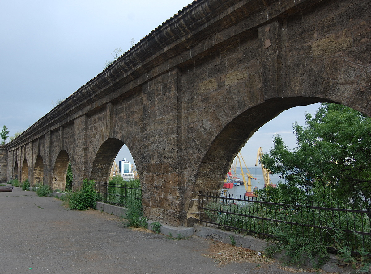 ЦПКиО им Т.Г. Шевченко, Одесса, июнь 2007